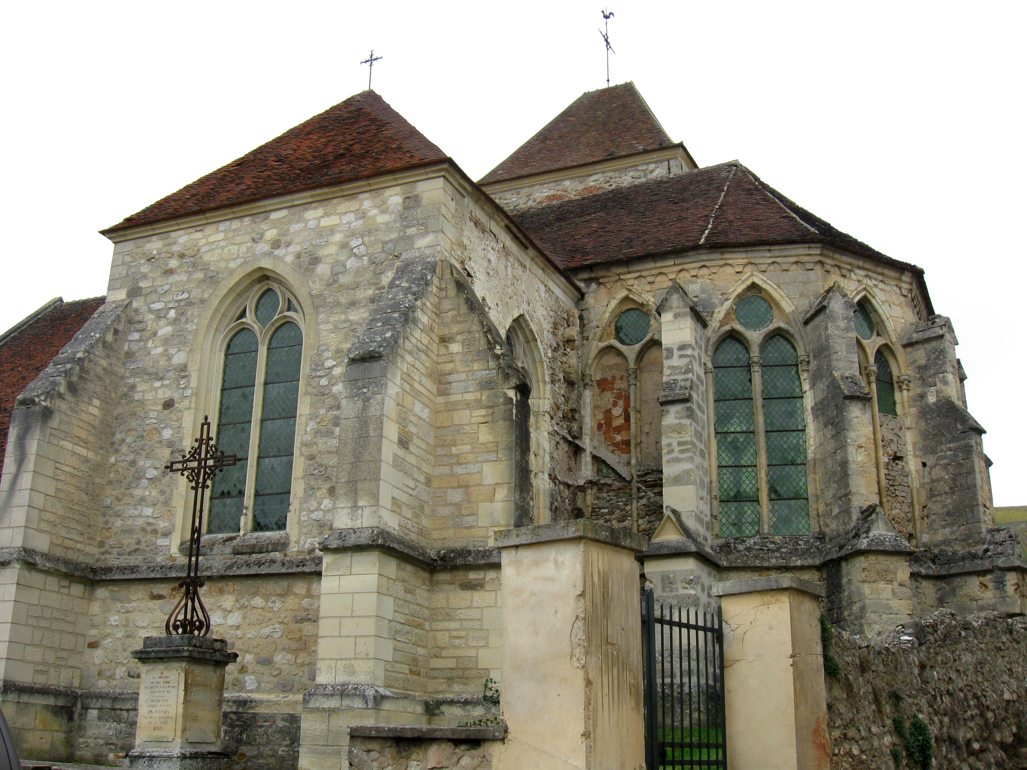 Église catholique Notre-Dame de Bonneil. (département de l'Aisne , région Picardie).